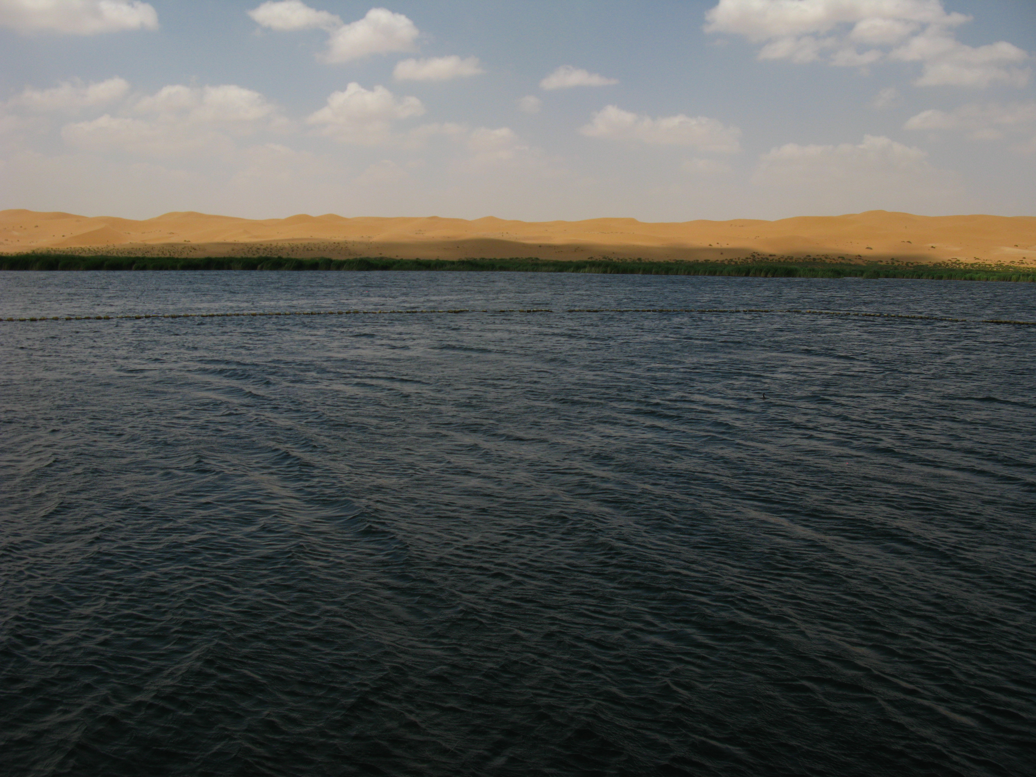 Moonlake